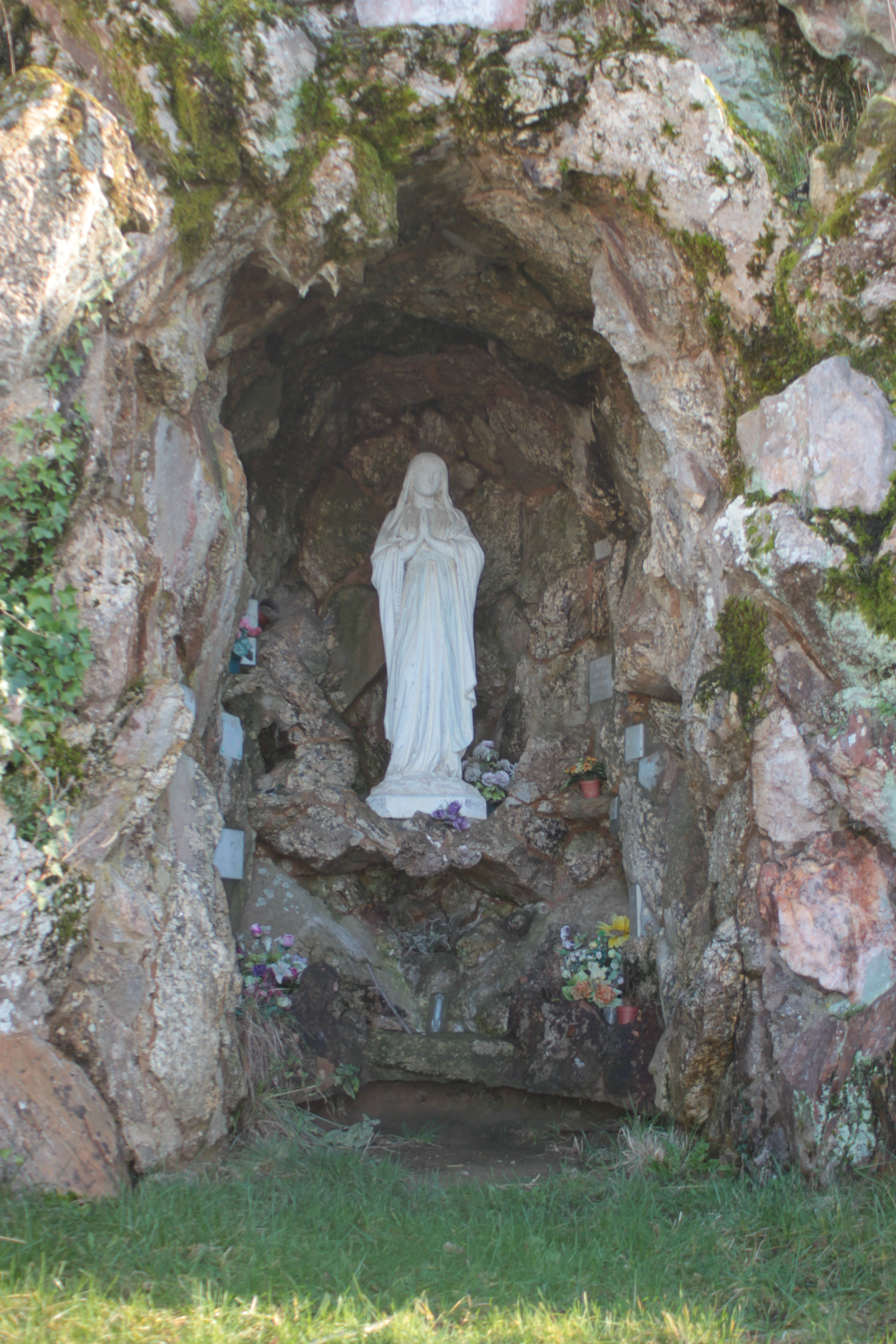 Grotte de Lourdes, Fr-44-Vigneux-de-Bretagne.